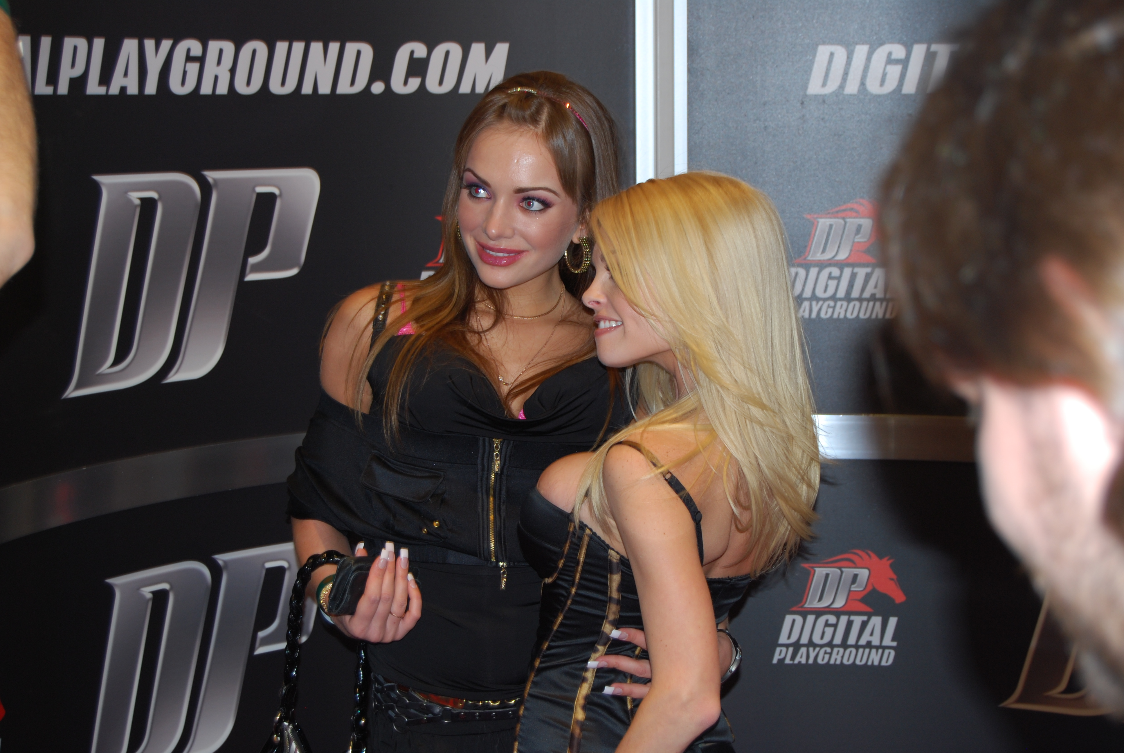 AEE2008_Nikon_Day1 194